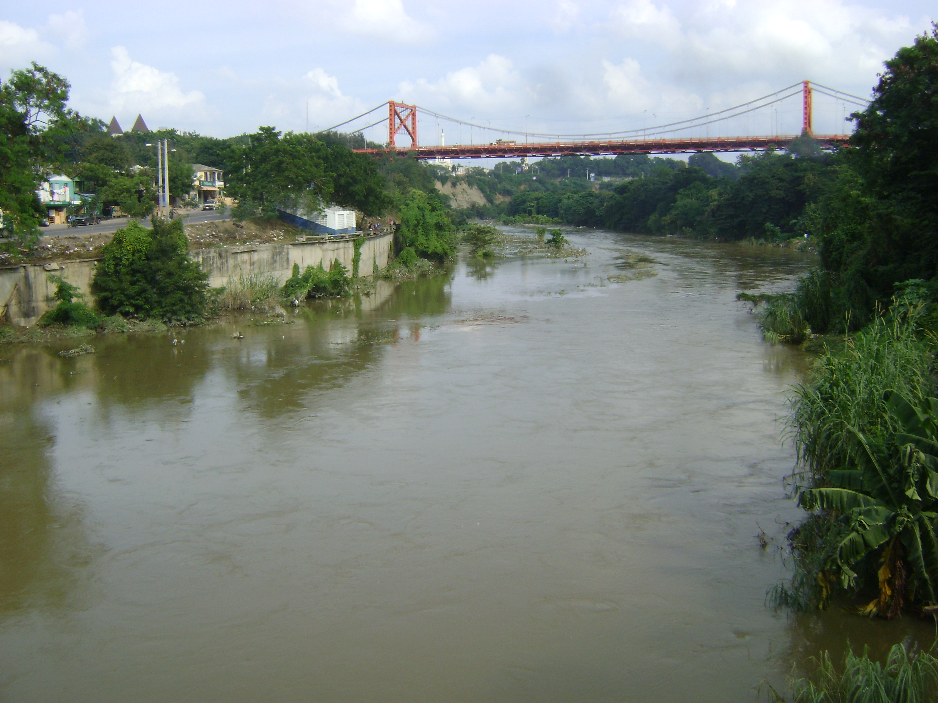 Hoogwater in de Rio Yaque del Norte bij Santiago de los Caballeros.